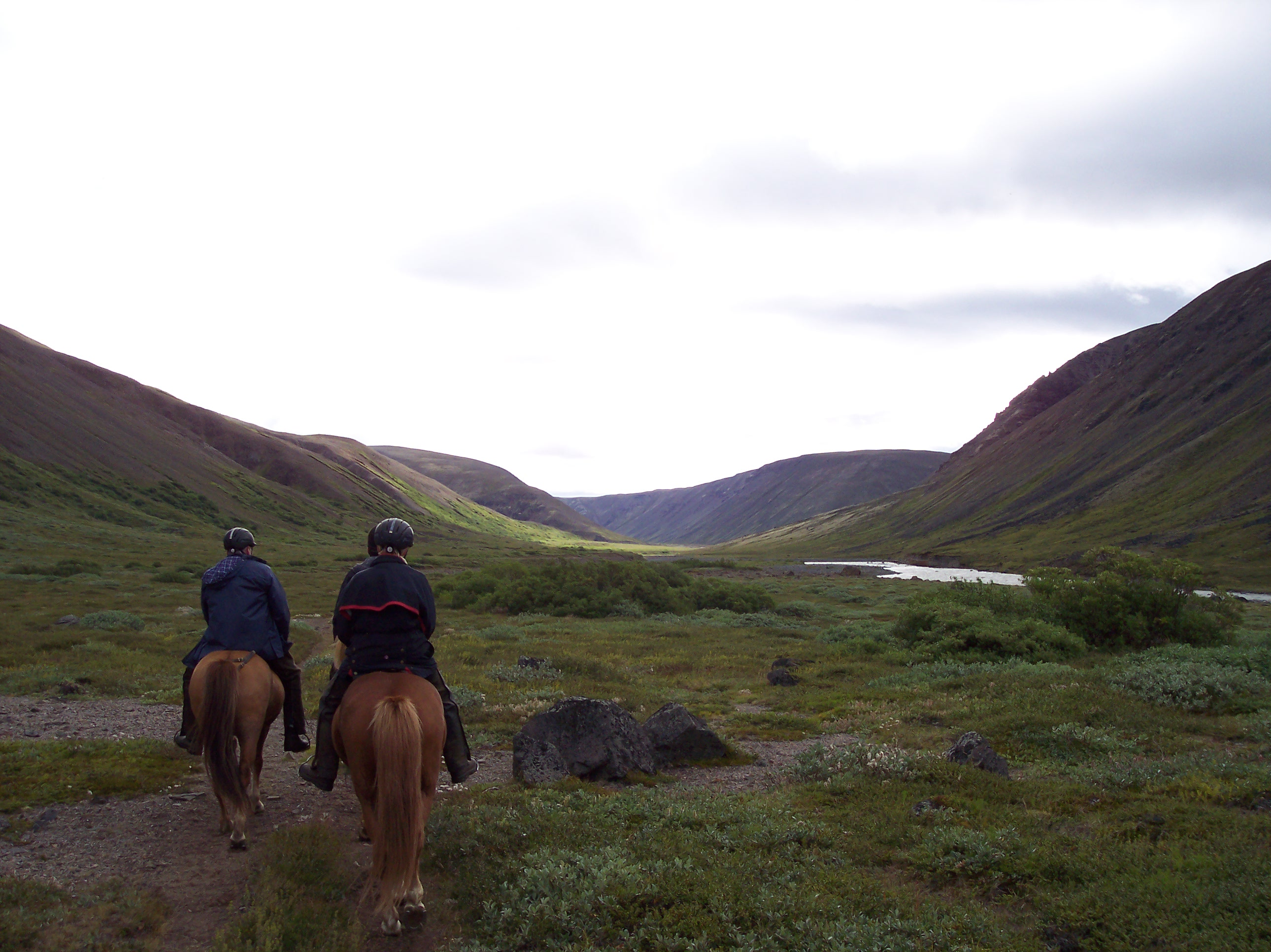 Austurdalur, Iceland.